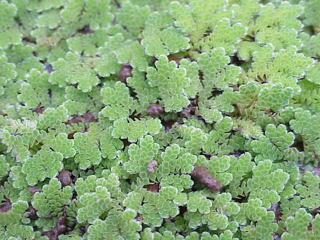 Species: Azolla caroliniana Family: Azollaceae Image No. 2